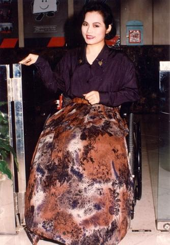 「月亮歌后」李佩菁於台視大樓一樓大廳留影，其右後方為第一代台視寶寶。